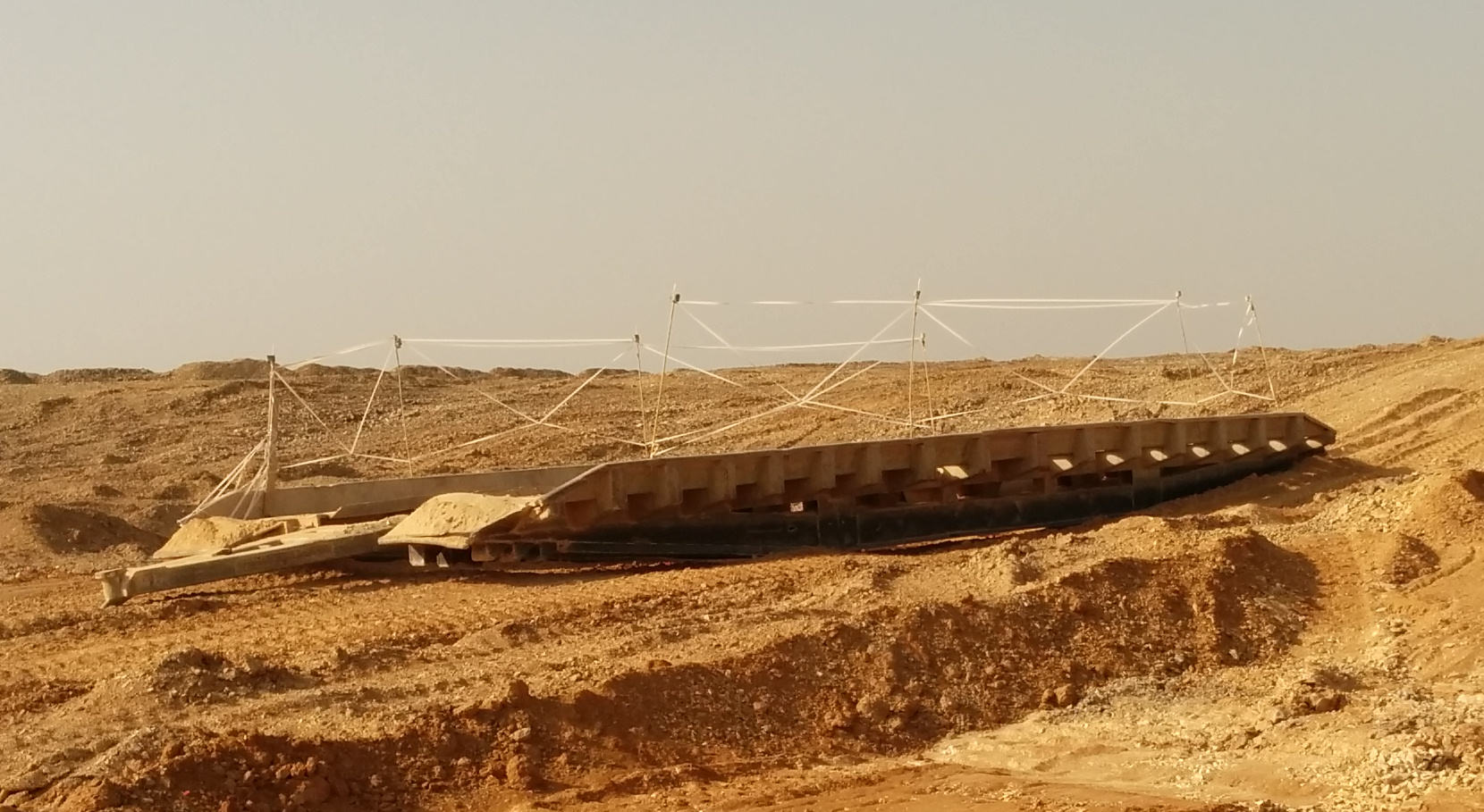 גשר מישר